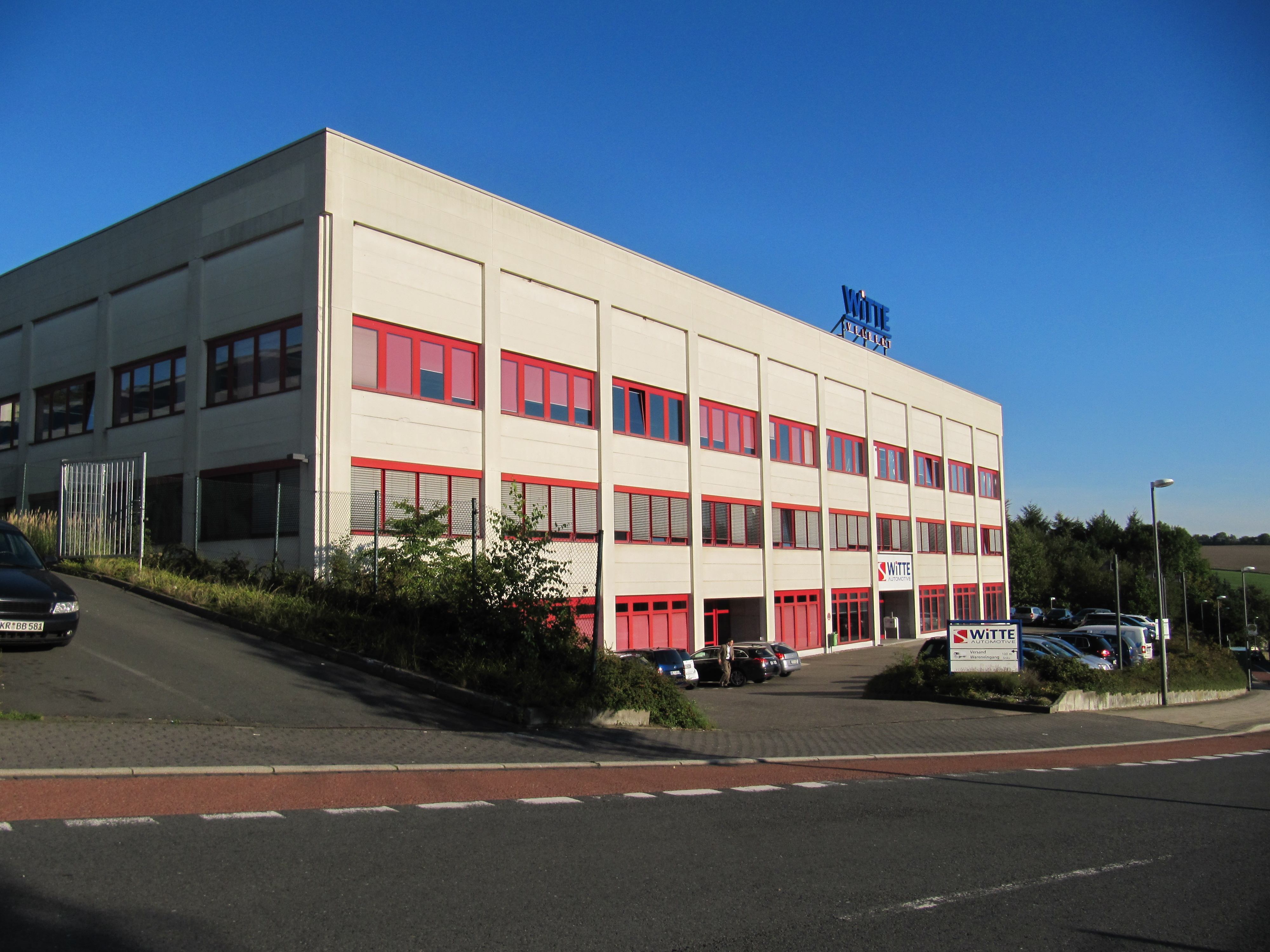 Hauptgebäude der Firma Witte in Velbert-Röbbeck